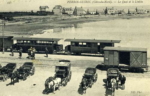 Voitures et wagons des Chemins de Fer des Côtes-du-Nord en gare de Perros Guirec